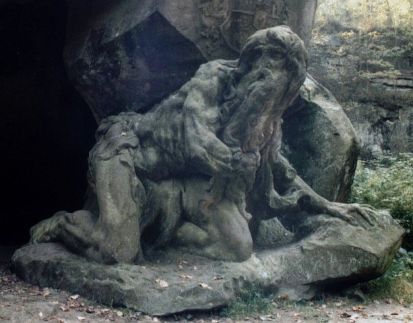 Poustevník Juan Garin, Nový les u Kuksu, Matyáš Bernard Braun a jeho dílna 1723-26